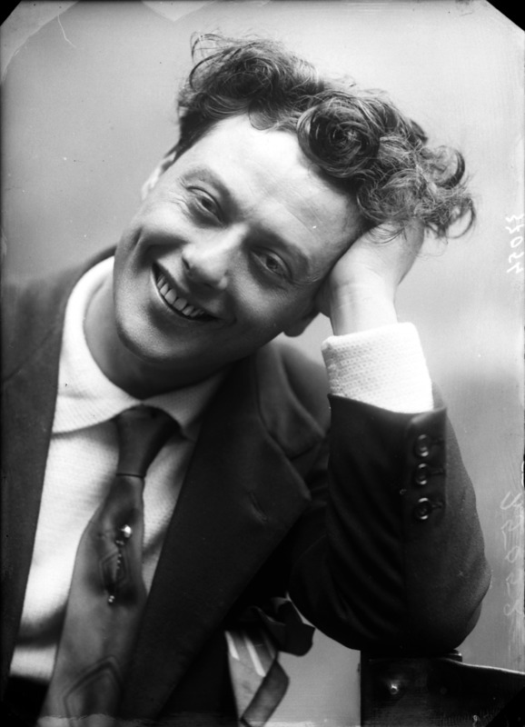 attore Gastone Monaldi